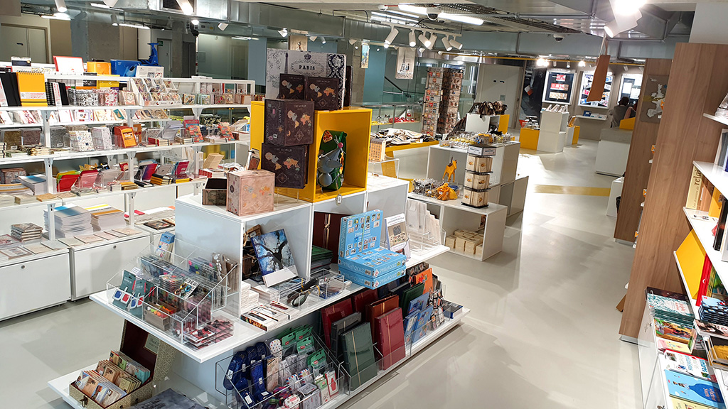 La boutique après la rénovation totale du musée de La Poste achevée fin 2019 : plus d’espace, plus de lumière, plus d’articles (souvenirs, papeterie, livres, jeux...).